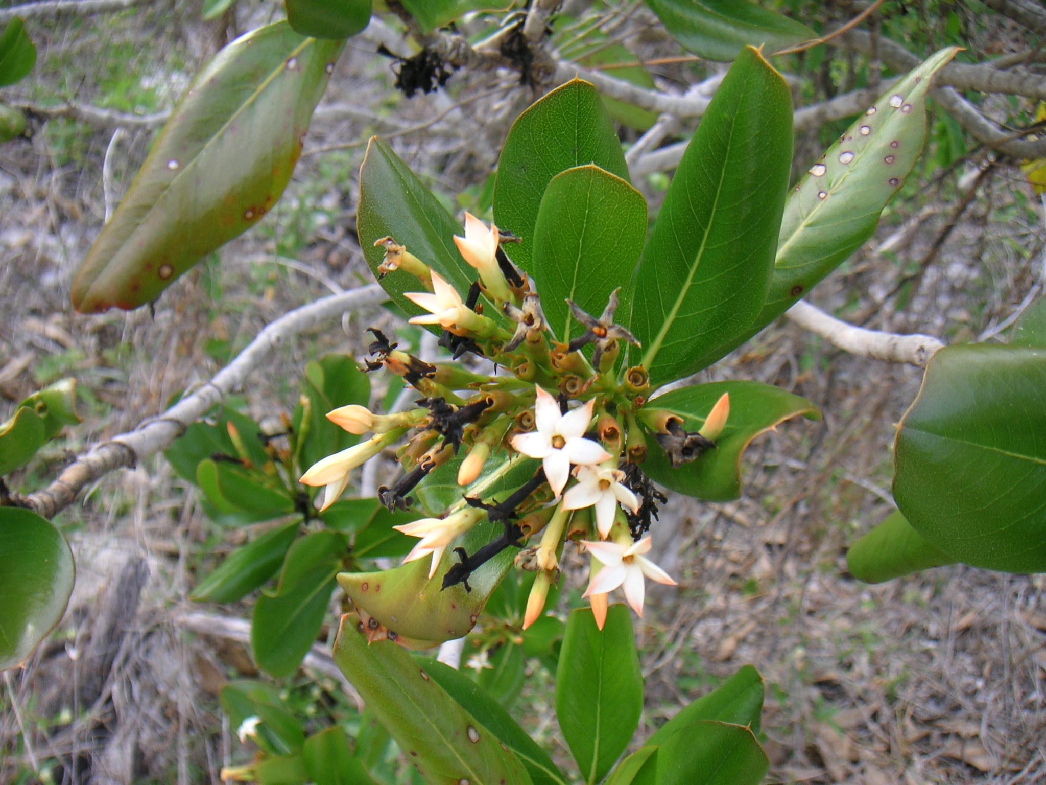 Casasia clusiifolia (Rubiaceae), Seven-year apple